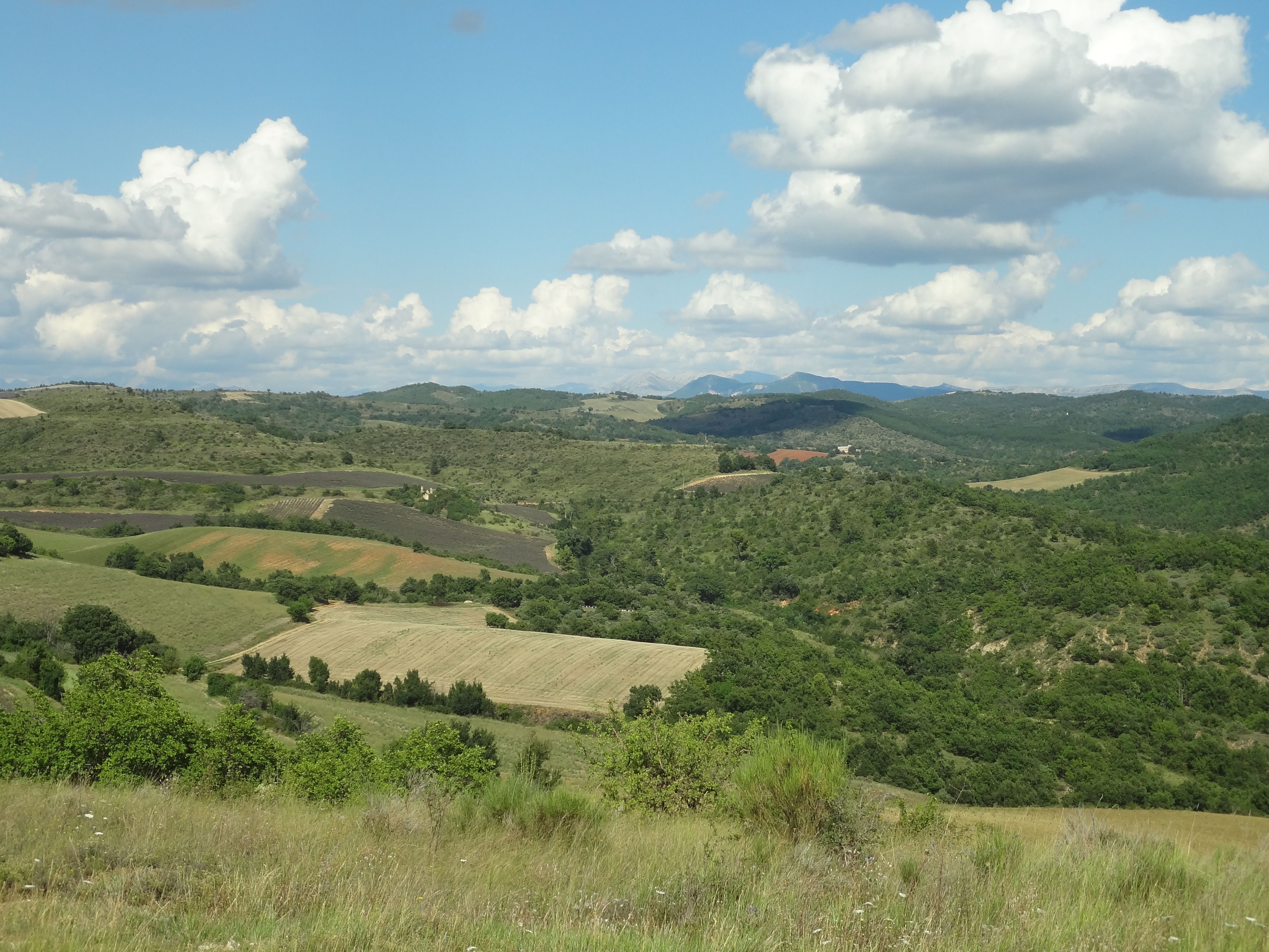 Plateau de Valensole à Puimichel (vers 650 m d'altitude)